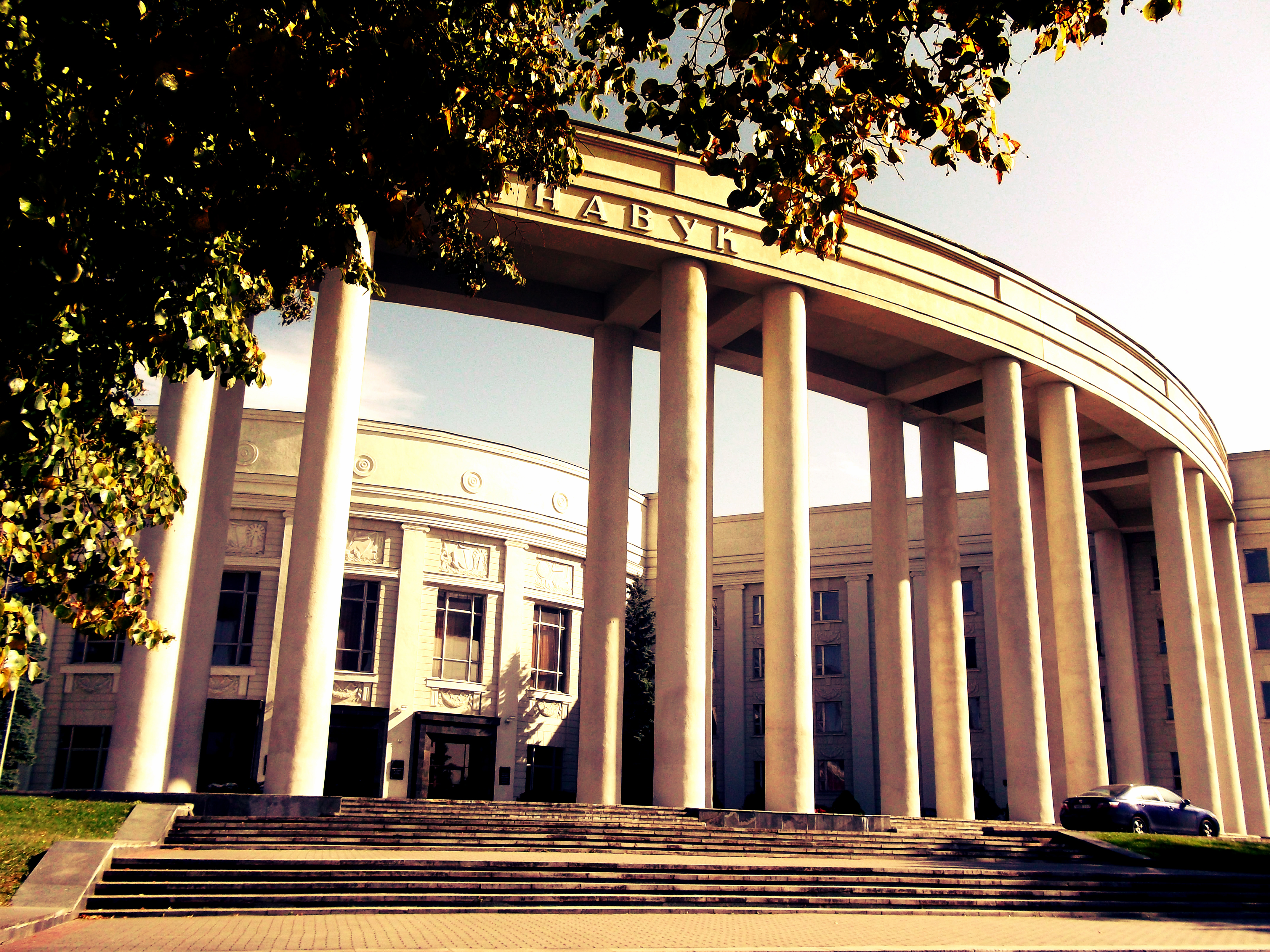 Беларуская (тарашкевіца): Будынак галоўнага корпуса Нацыянальнай акадэміі навук Беларусі. г. Менск This is a photo of Belarusian heritage monument. Reference number: 712Г000198 ( WLM)